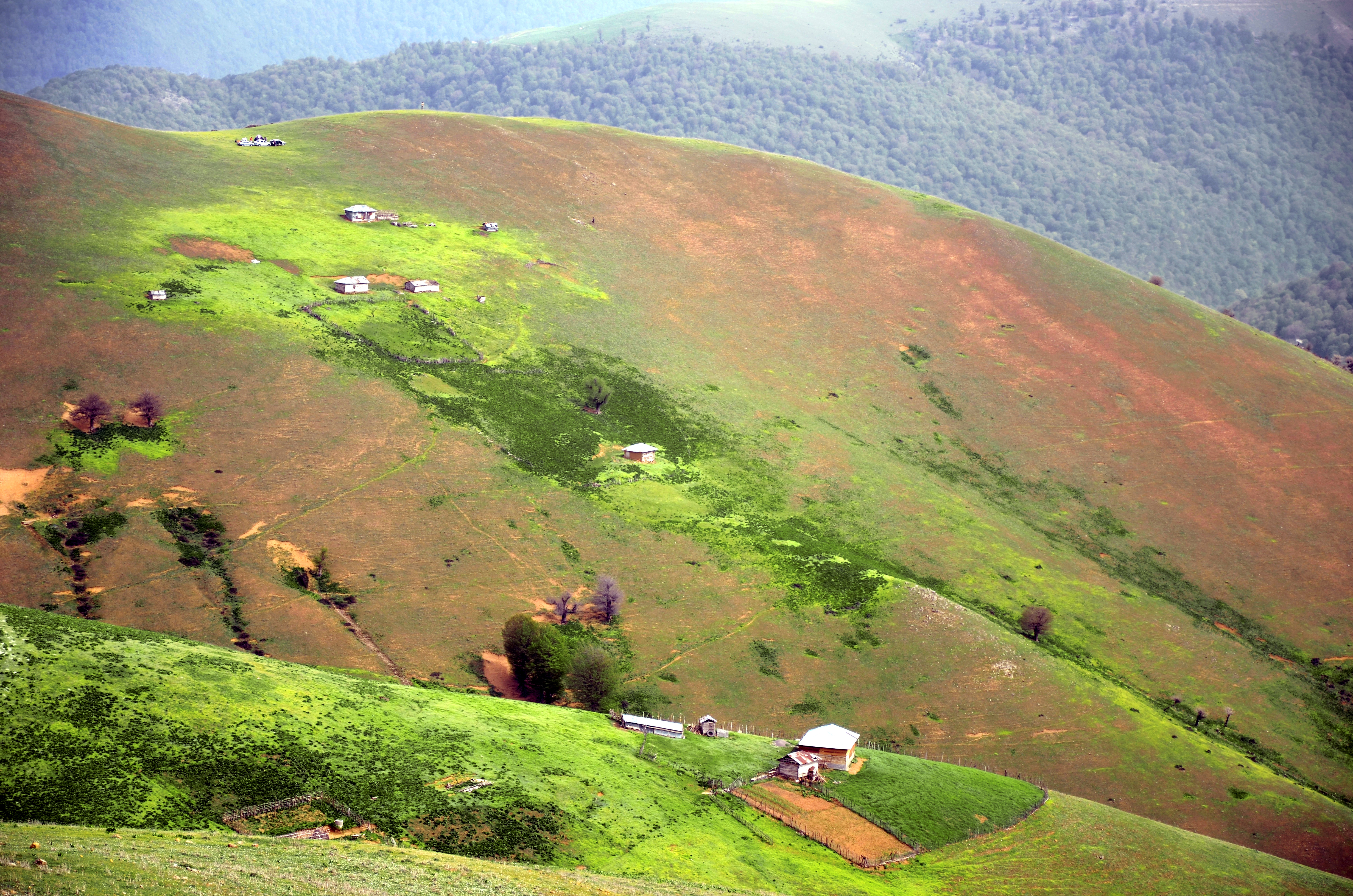 Asalem Khalkhal road - Zalzareh